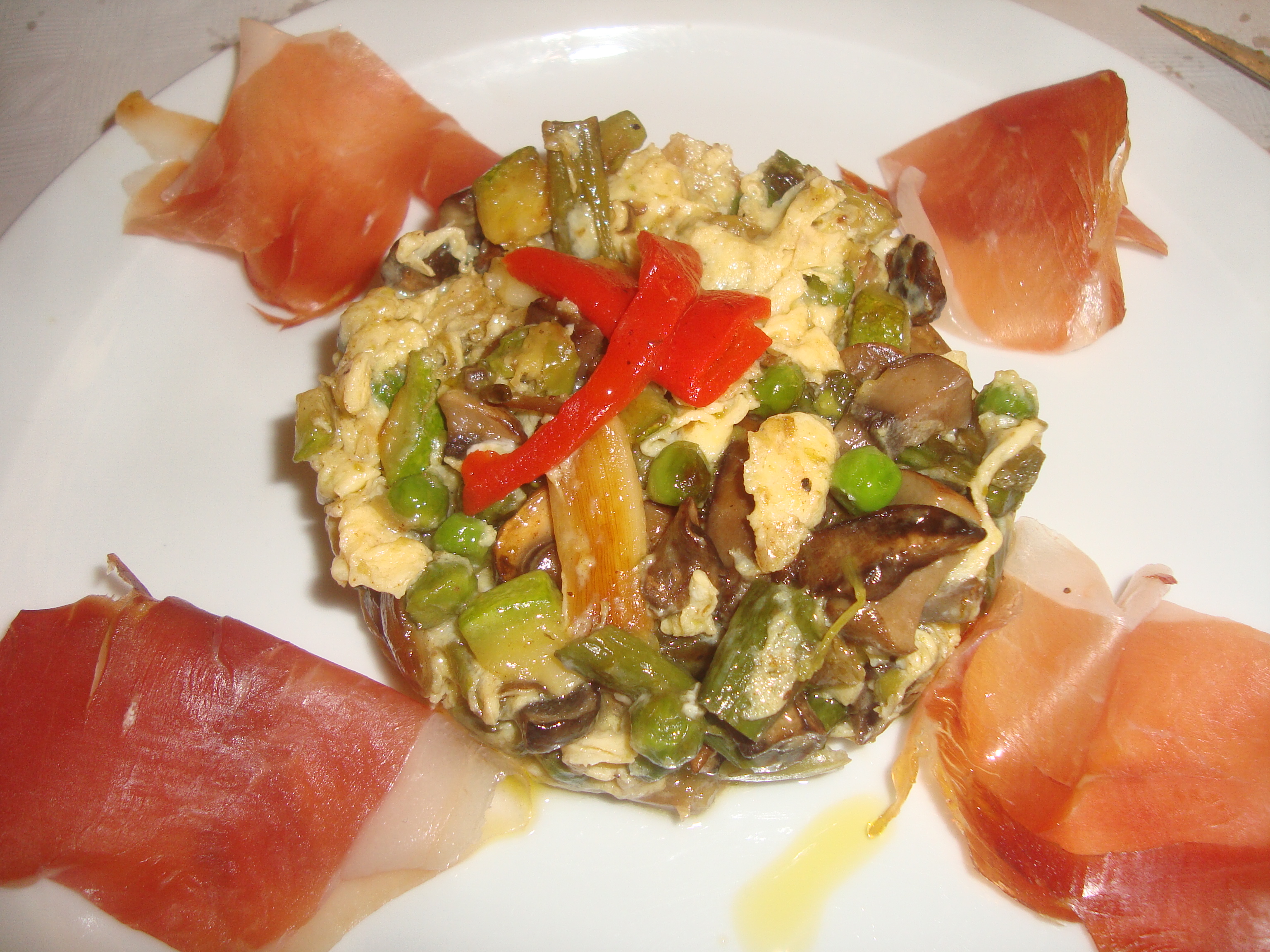 Revuelto de huevos con verduras tiernas (espárragos, habitas, ajetes, champiñones, pimiento del piquillo) y jamón serrano. Cocinero Víctor Pérez (Torreblanca, España)